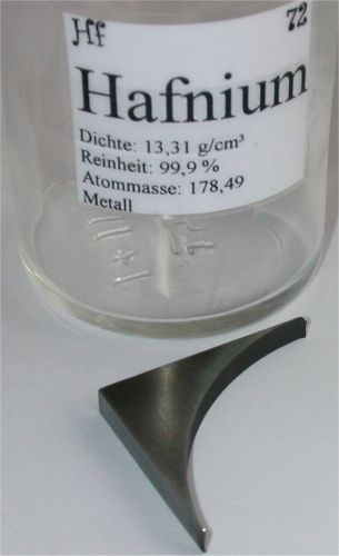 Bildbeschreibung: Hafnium-Blech aus Industrieabfall Quelle: selbst fotografiert Fotograf/Zeichner: Tomihahndorf Datum: März 2006